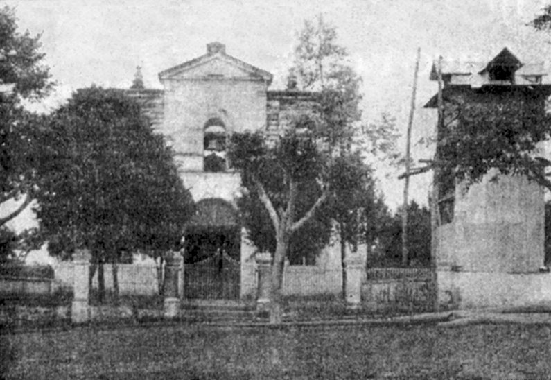 Iglesia de Escazú, Costa Rica, en 1915.